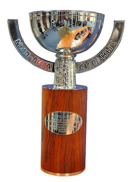 Кубок Регионов — хоккейный приз, вручаемый победителю серии плей-офф Молодежной хоккейной лиги Дивизиона «Б», начиная с сезона 2011/2012.